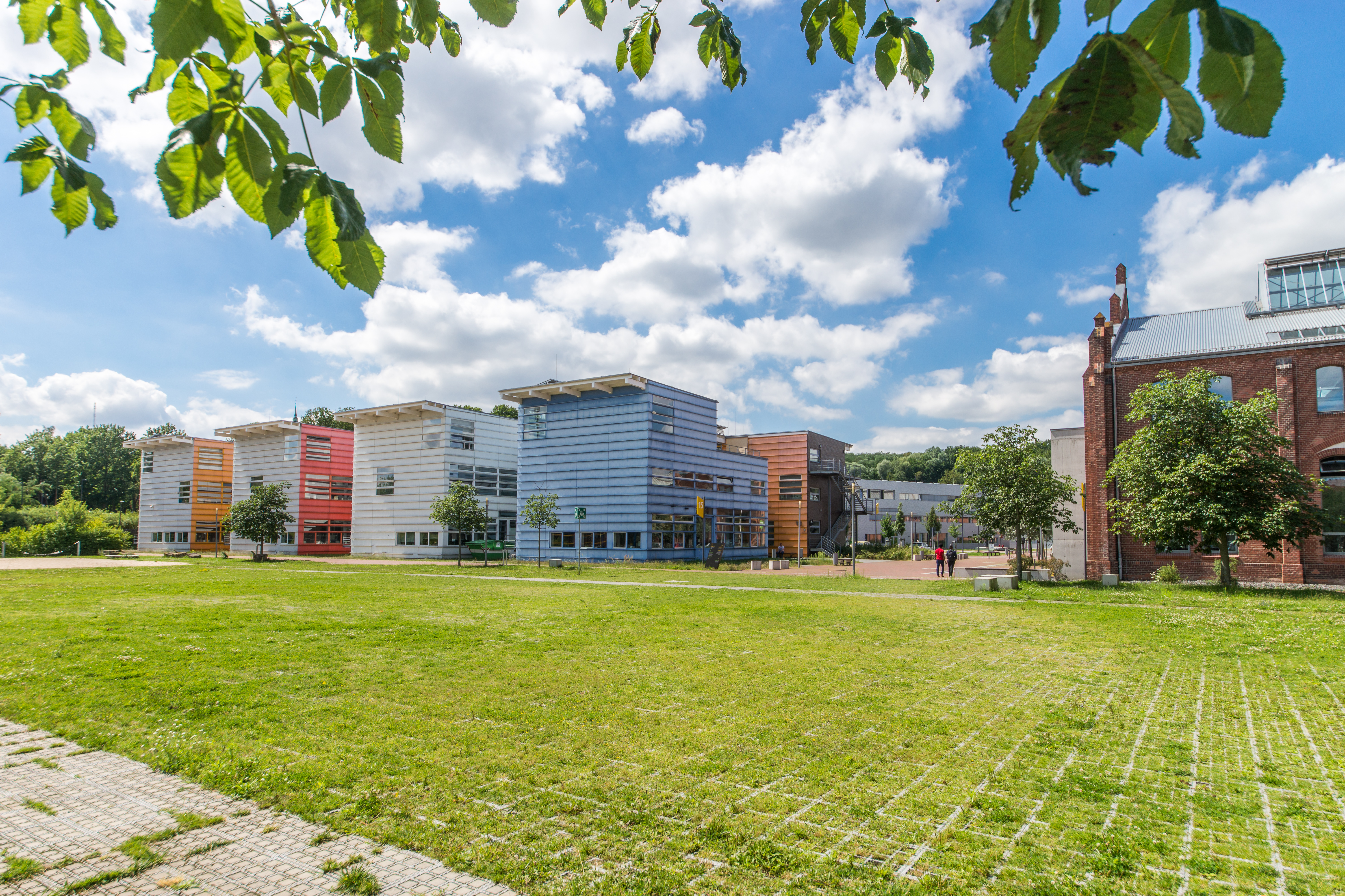 Fotograf: Matthias Friel